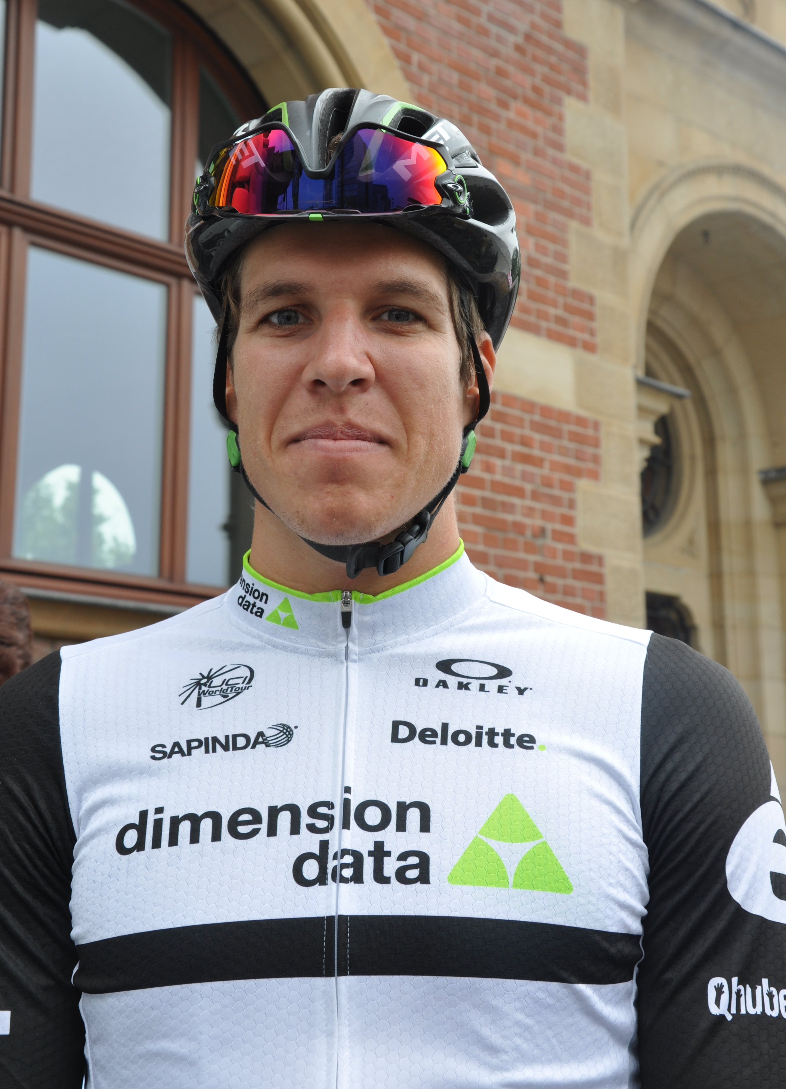 Nicolas Dougall, südafrikanischer Radrennfahrer